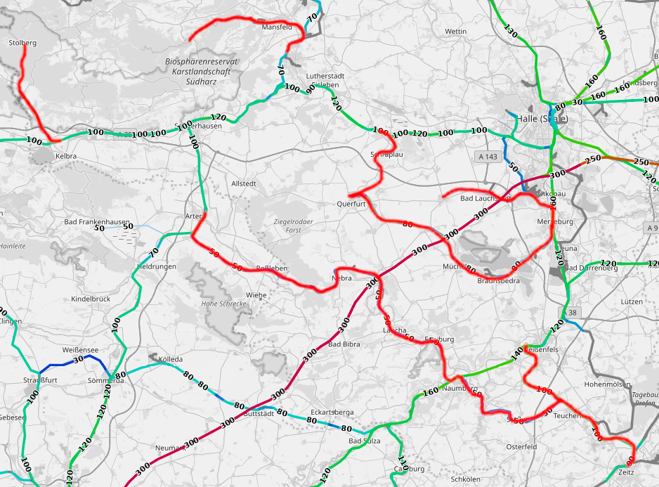 Die ehemalig von der Burgenlandbahn betriebenen Strecken (rot). Auch zu erkennen: Die Neubaustrecke Leipzig/Halle-Erfurt (dunkelrot), die mehrfach gekreuzt wird. Darstellung: OpenRailwayMap